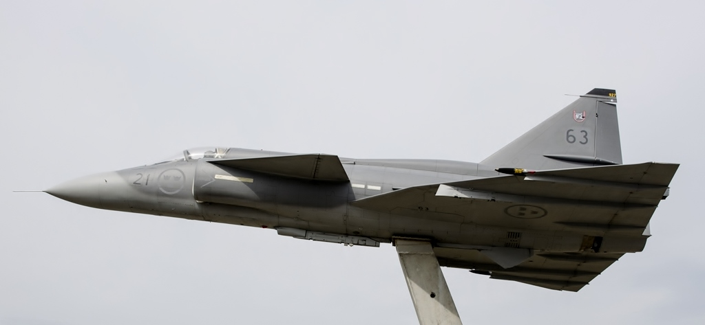 AJSH 37 Viggen vid Flygmuseet F 21 i Luleå. Flygplanet typgodkändes år 1978 som SH 37, och tjänstgjorde sedan som "F 21-63" på F 21. År 1995 modifierades individen till AJSH 37. Flygplanet tjänstgjorde sedan fram till år 1997, då det togs ur tjänst och kasserades, med en total flygtid på 1978 timmar.